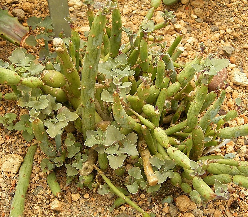 Senecio articulatus